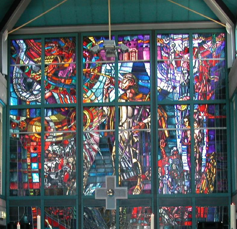 Raam Felicitaskerk, Spijkenisse.